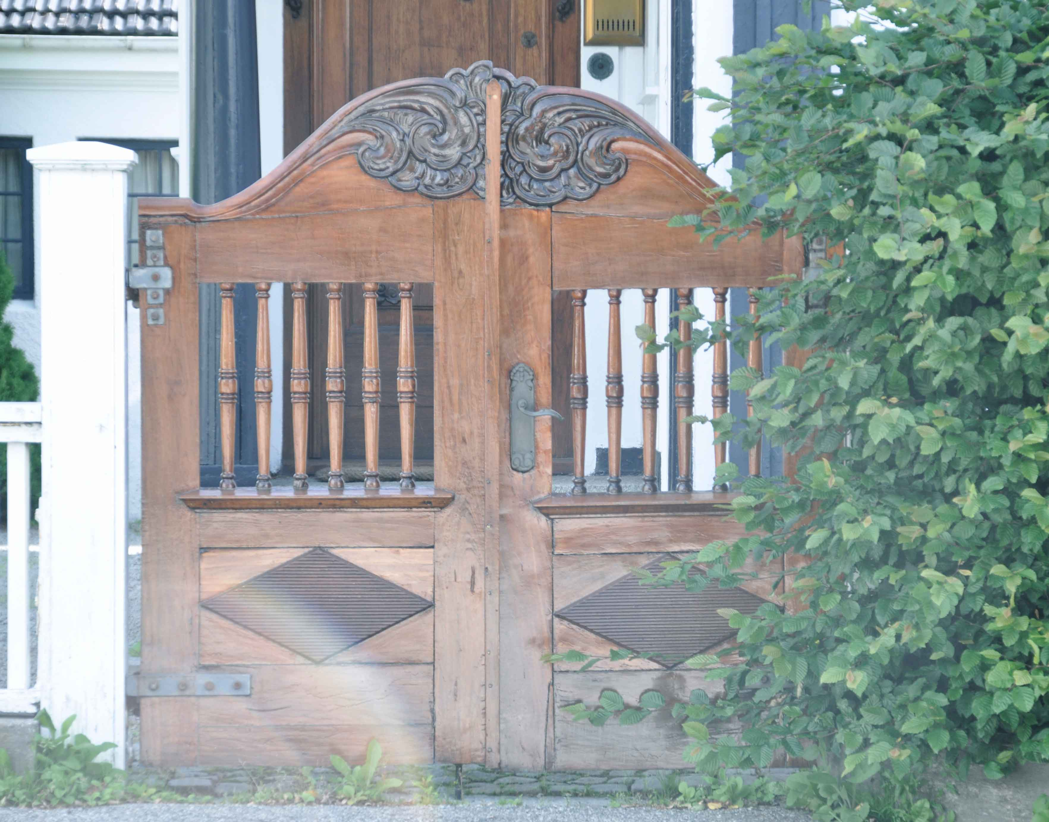 Hageport, Eiganesveien 82, Michael Slettebø